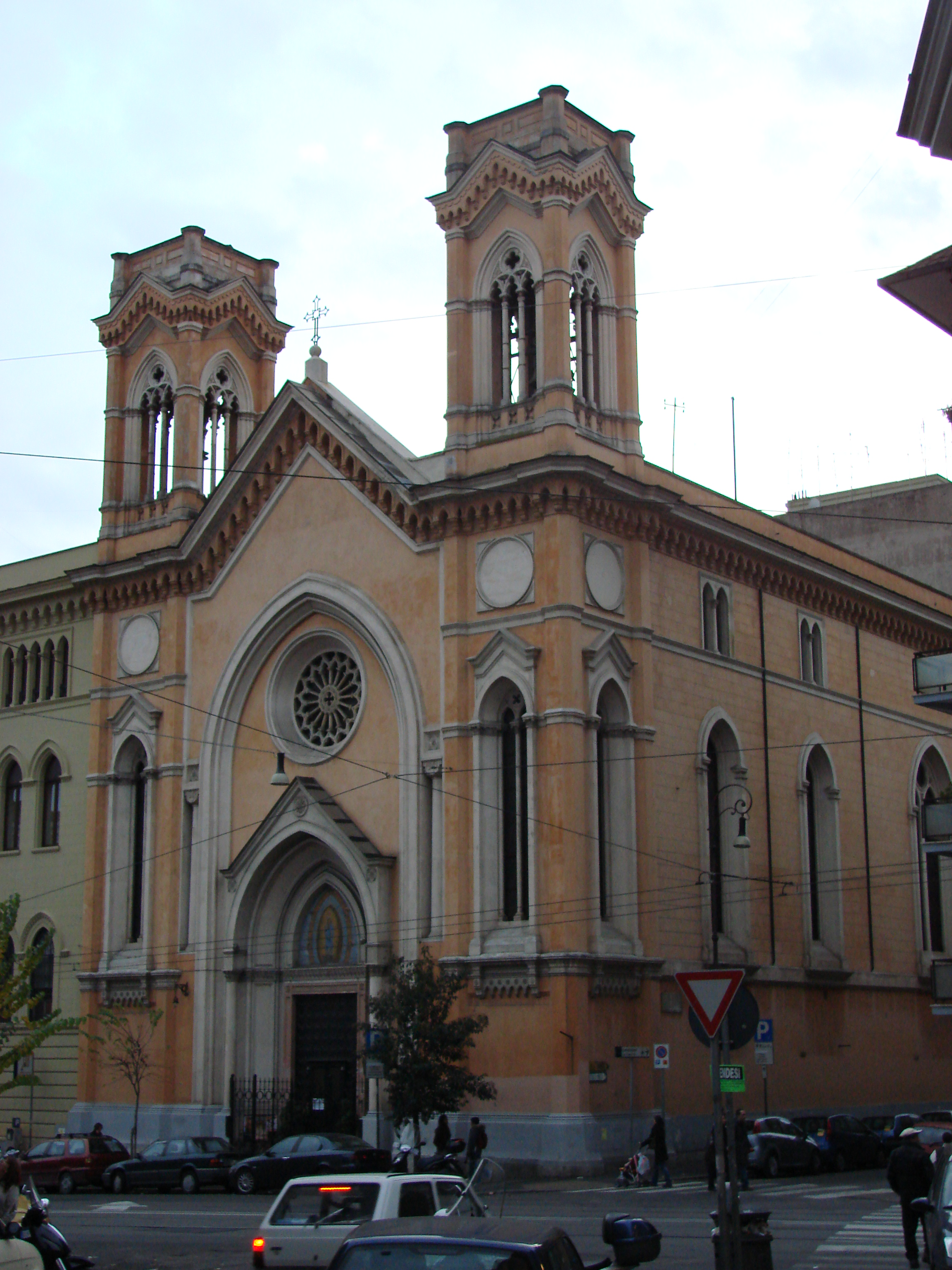 Chiesa di Santa Maria Immacolata all'Esquilino